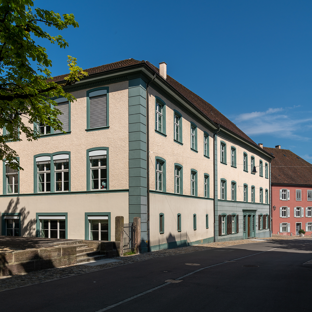 Schulhaus Hugenfeld in Rheinfelden (AG)